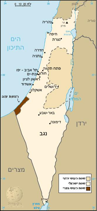 נוצר על ידי משתמש:H2O